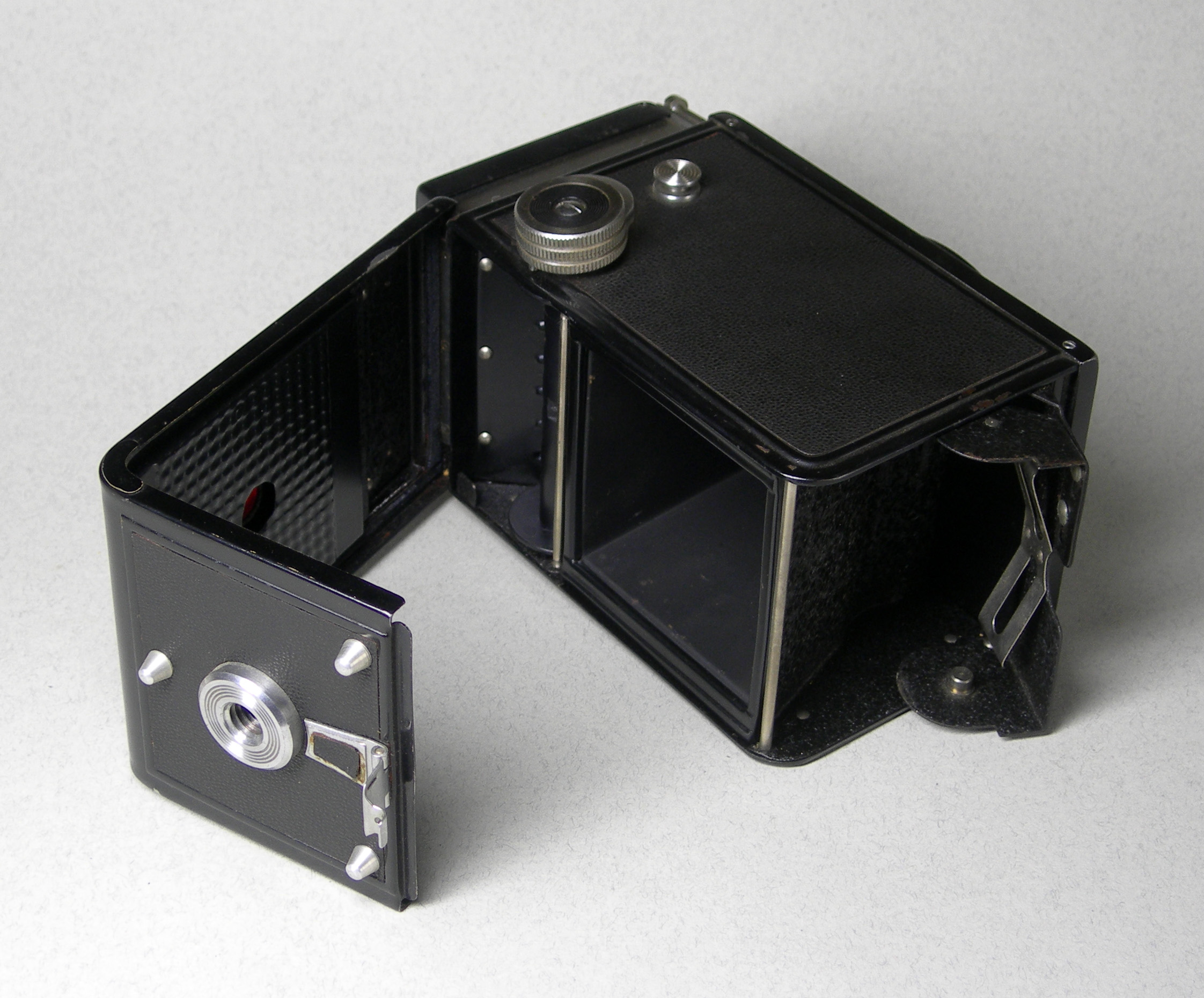 Gehäuse einer einfachen 6x6-Kamera